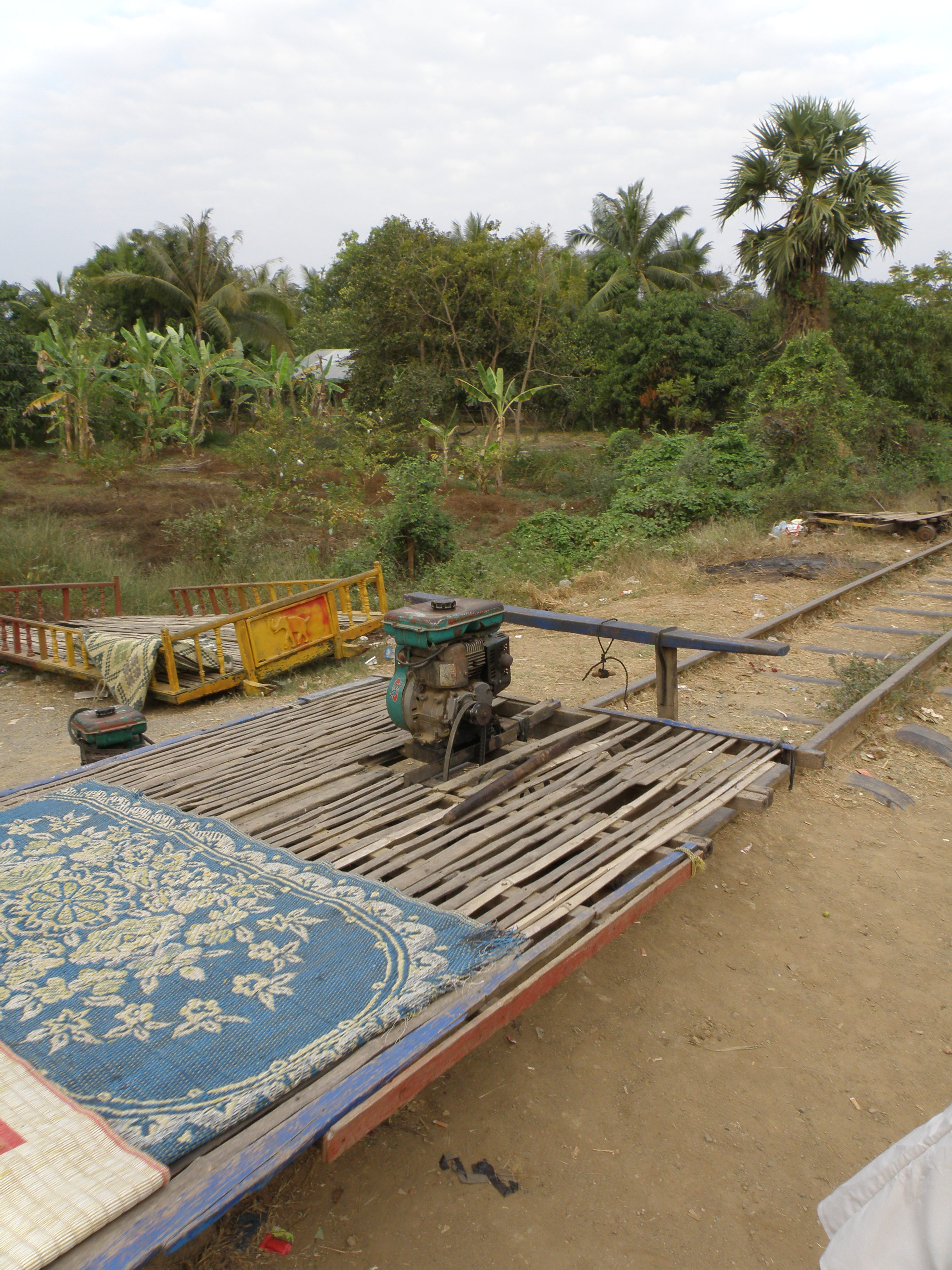 Cambodge - Battambang - Le train de bambou - Moteur